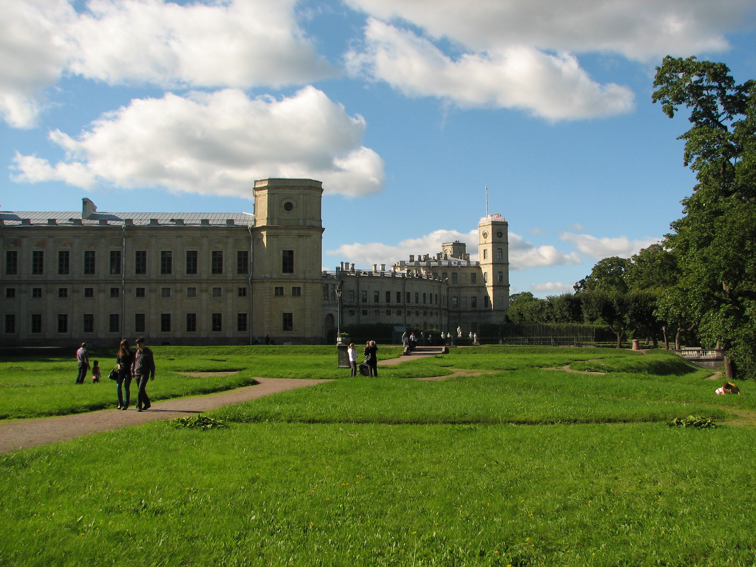 Гатчина. Вид на Большой Гатчинский дворец из Нижнего Голландского сада